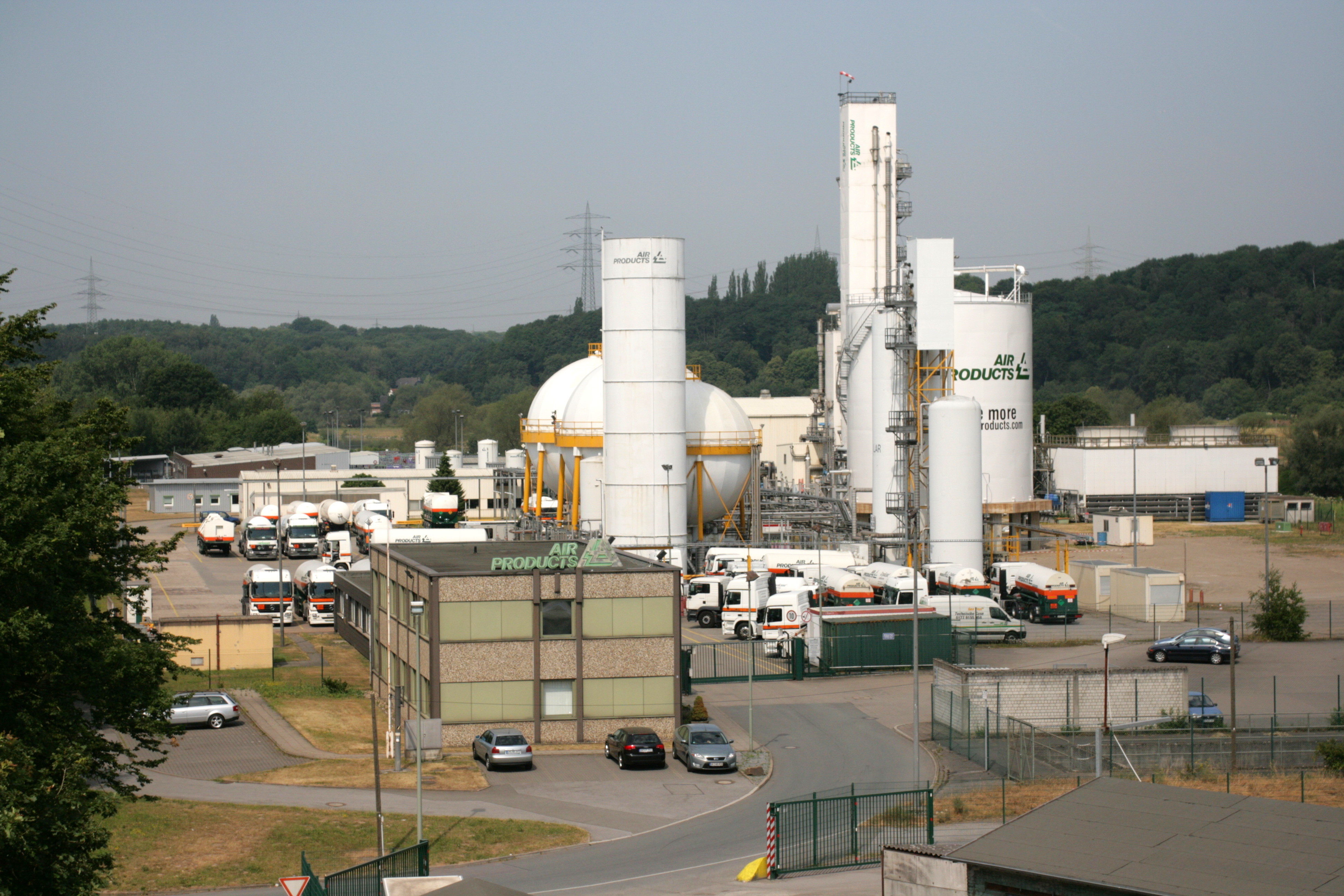 Blick nach Hattingen auf der Ruhrbrücke Kosterstraße zwischen Hattingen und Bochum-Stiepel